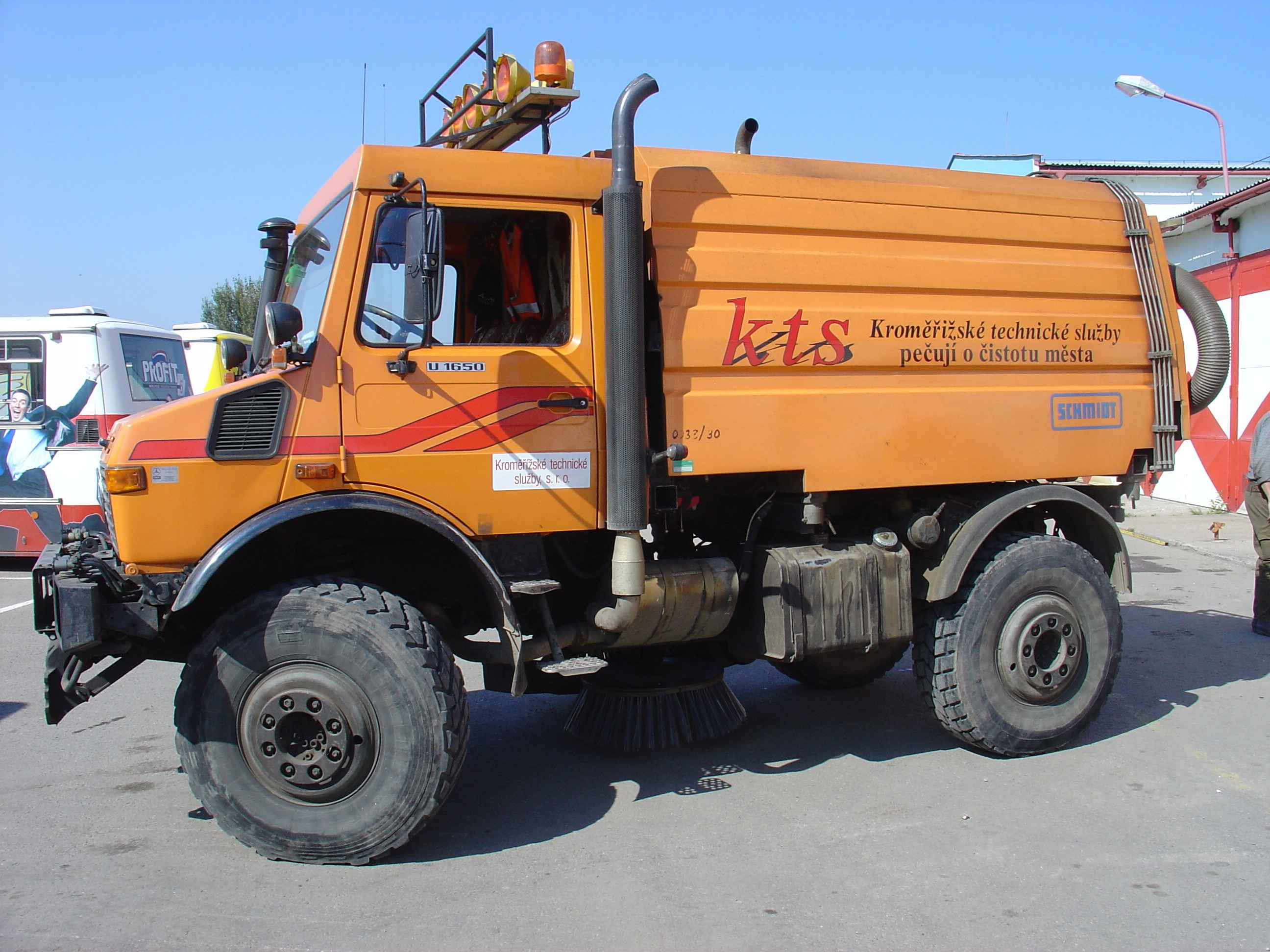 Čistící vůz - Kroměřížské technické služby, s.r.o., Mercedes Unimog U1650